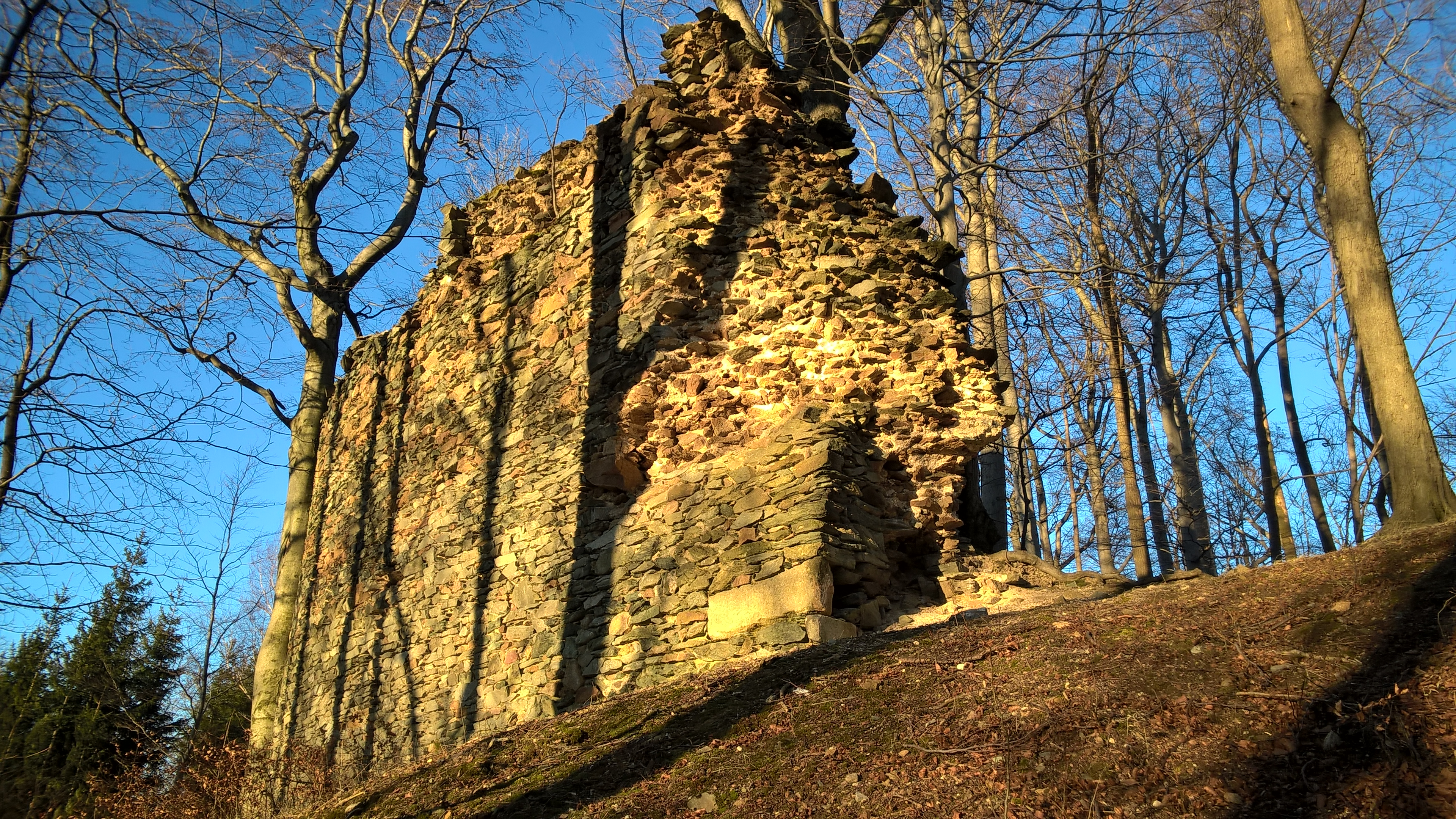 Hrad Raimund, severozápadní výběžek Vápenného vrchu, Bílý Kostel nad Nisou.